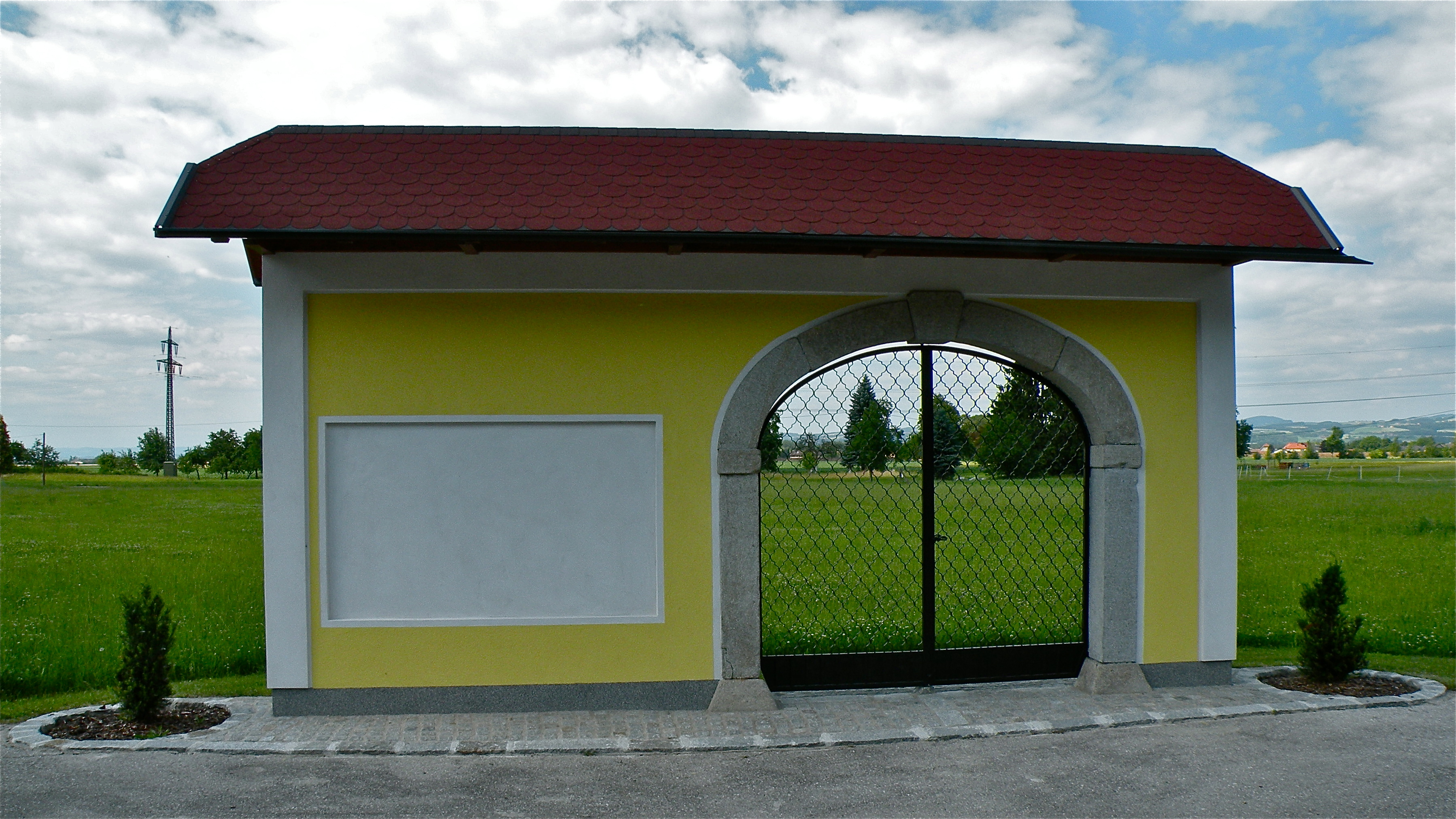 Denkmal Manner Hütting Mitterkirchen im Machland Oberösterreich